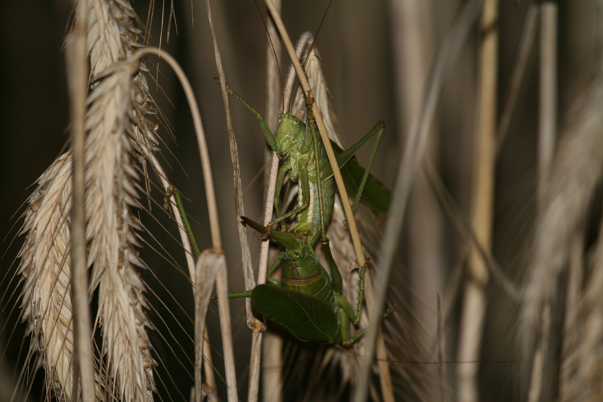 Grünes Heupferd.